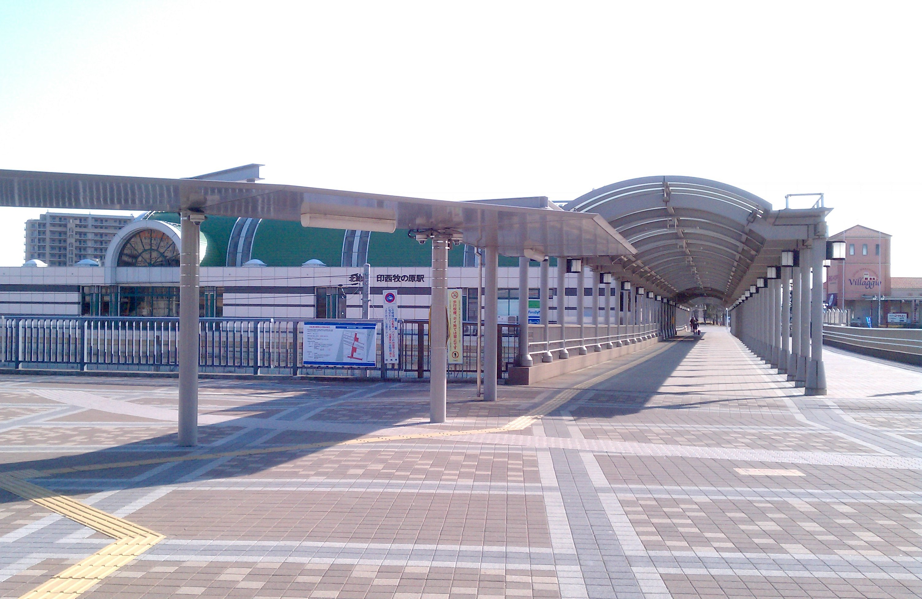 北総線 印西牧の原駅 駅入口 （2013年2月撮影）